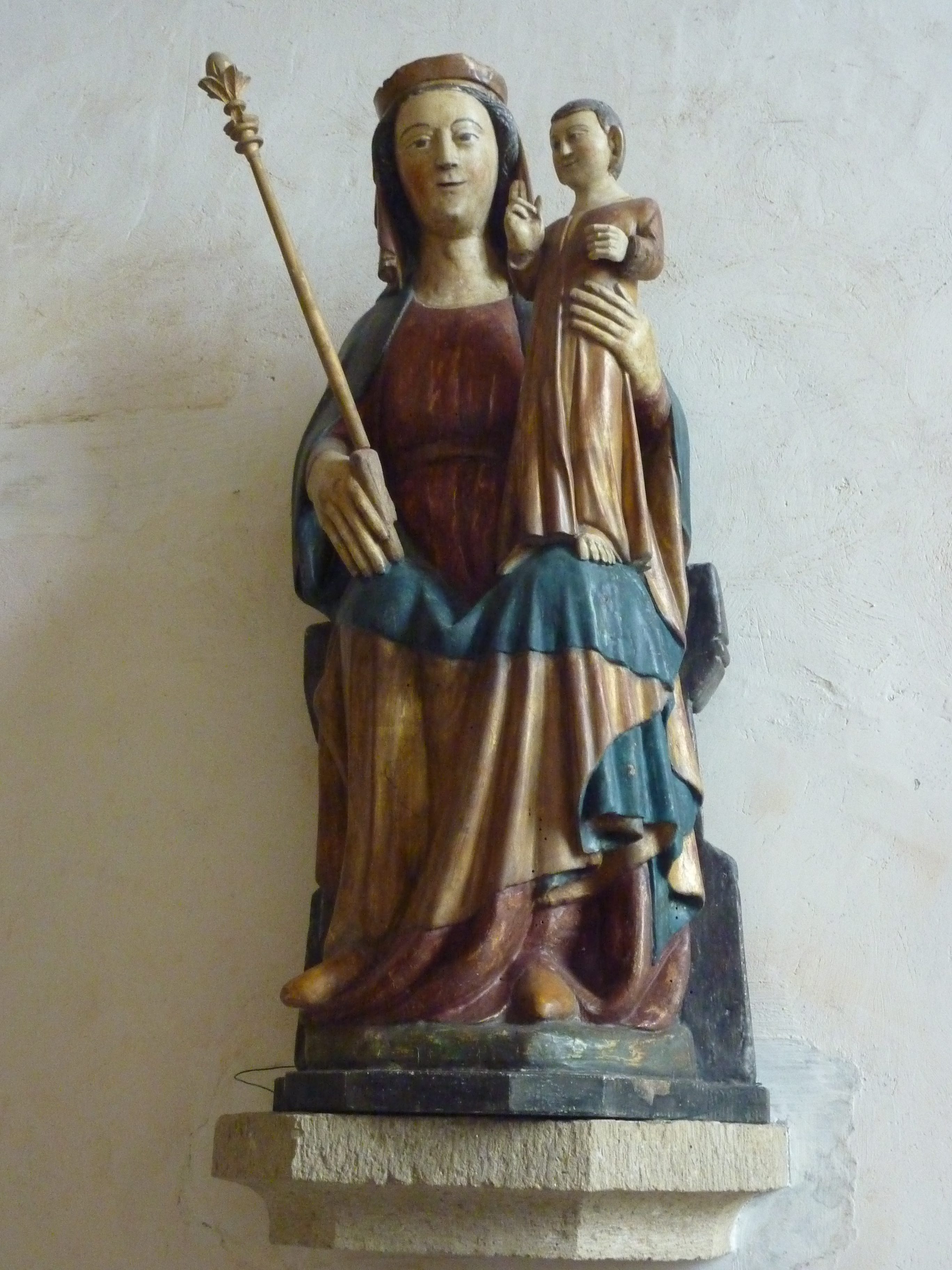 Plouha, chapelle de Kermaria-an-Iskuit, Vierge à l'Enfant